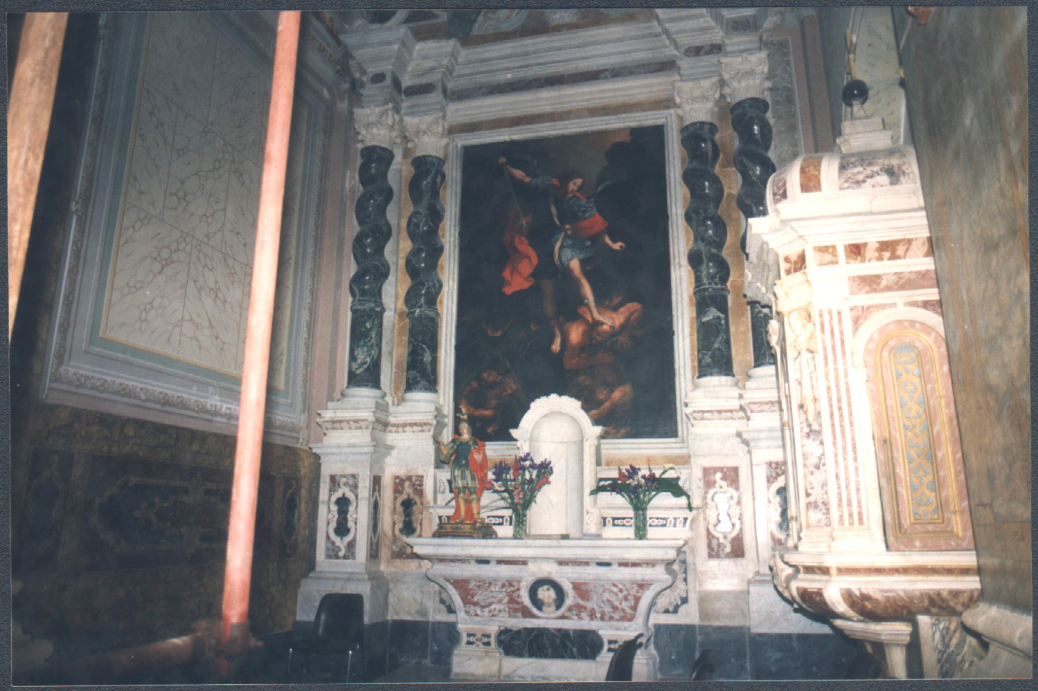 Altare di san Michele, Cattedrale di Ales